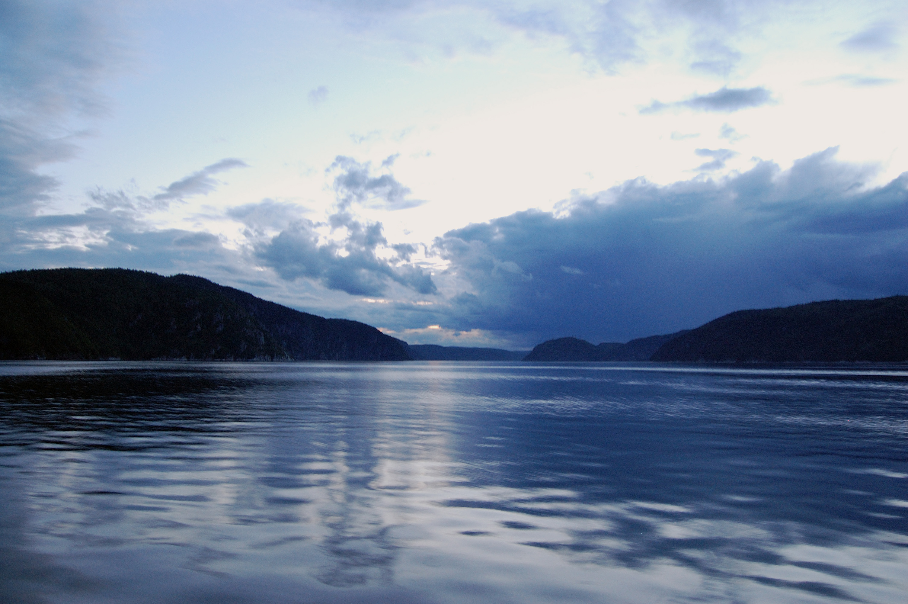 Le cap de la Boule sur le Saguenay. Une fin de journée sur le Saguenay. Cette photo a prise à bord du traversier entre Baie-Sainte-Catherine et Tadoussac le 7 juillet 2007.